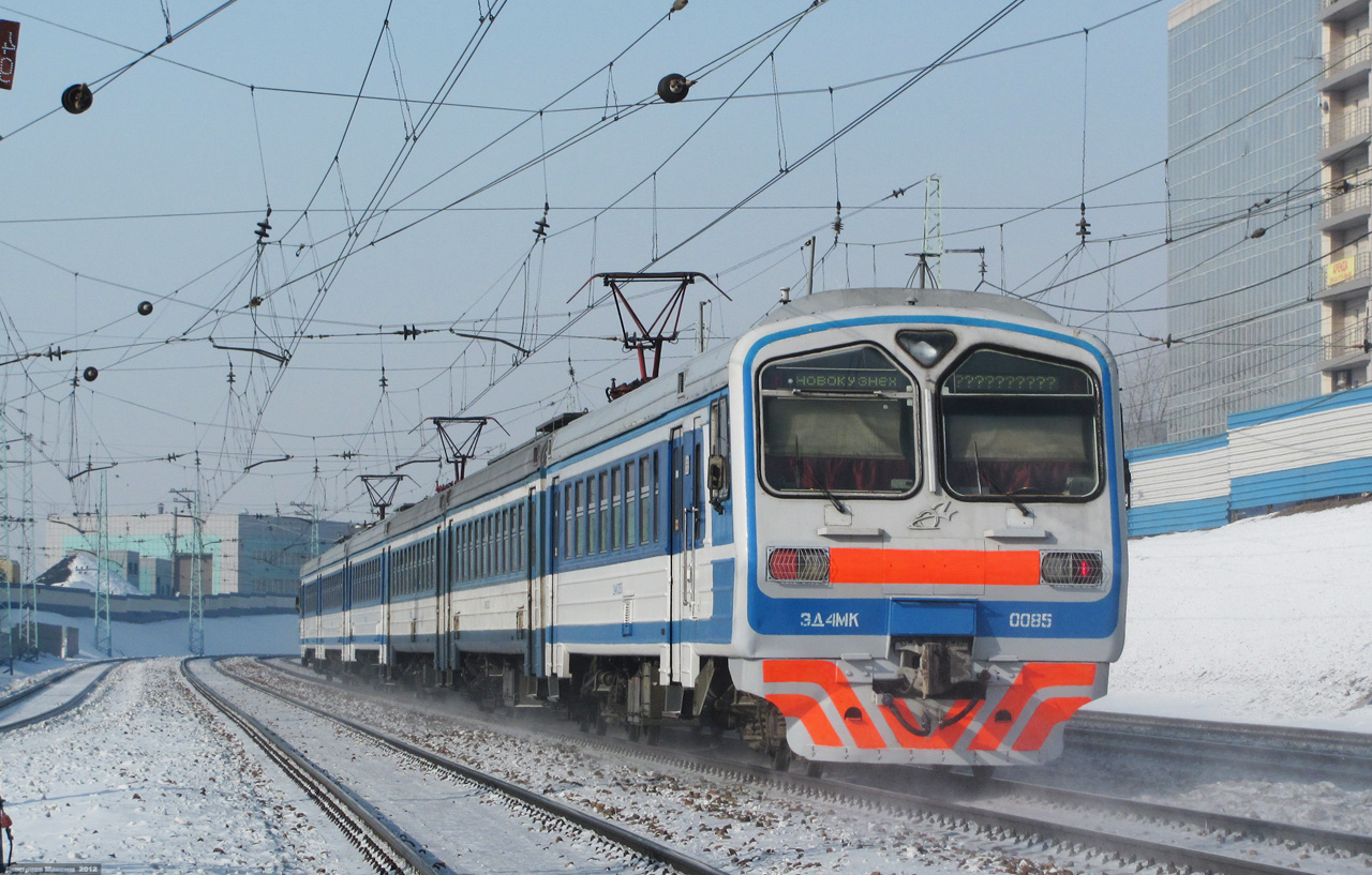 Электропоезд повышенной комфортности, построен в 8-вагонной составности 23.04.2003 — с завода поступил в ТЧ-4 Новосибирск Западно-Сибирской ж. д. Курсировал по маршруту Новосибирск — Омск (экспресс), носил именное название "Ласточка" с 24.01.2013 по 15.05.2013 эксплуатировался на маршруте № 847/848 Новокузнецк — Новосибирск вместо ЭД4МК-0092 В конце мая 2013 года передан в ТЧ-20 Апрелевка Московской ж. д. КР-2 Московский ЛРЗ 11.2015 г, дополнен до 10-вагонной составности вагонами: ЭД4М1-001103, ЭД4М-016004